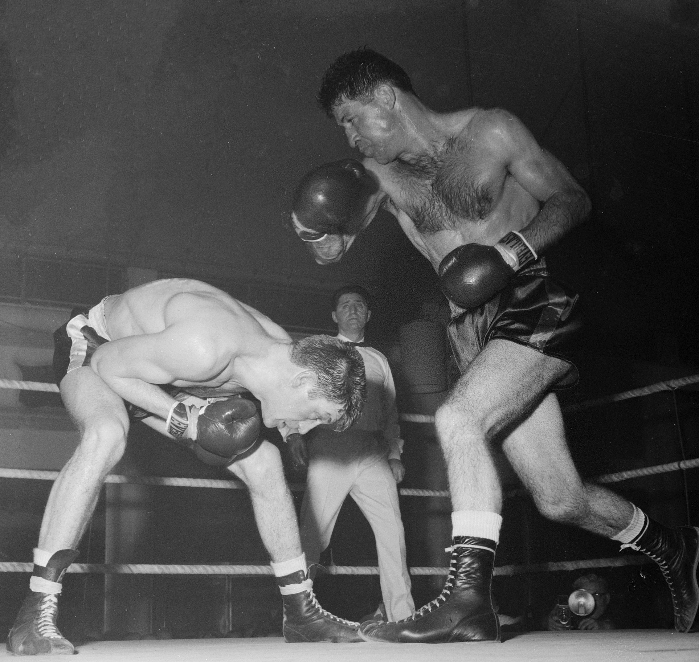 Boksen. Nelis van Oostrum en Leen Jansen